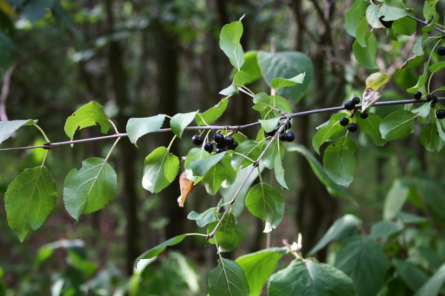 Gewöhnlicher Kreuzdorn (Rhamnus cathartica), Kreuzdorngewächse (Rhamnaceae) - Österreich/Austria/Autriche: Niederösterreich, Weinviertel, „Steinbergwald“ zwischen Zistersdorf und Neusiedl an der Zaya